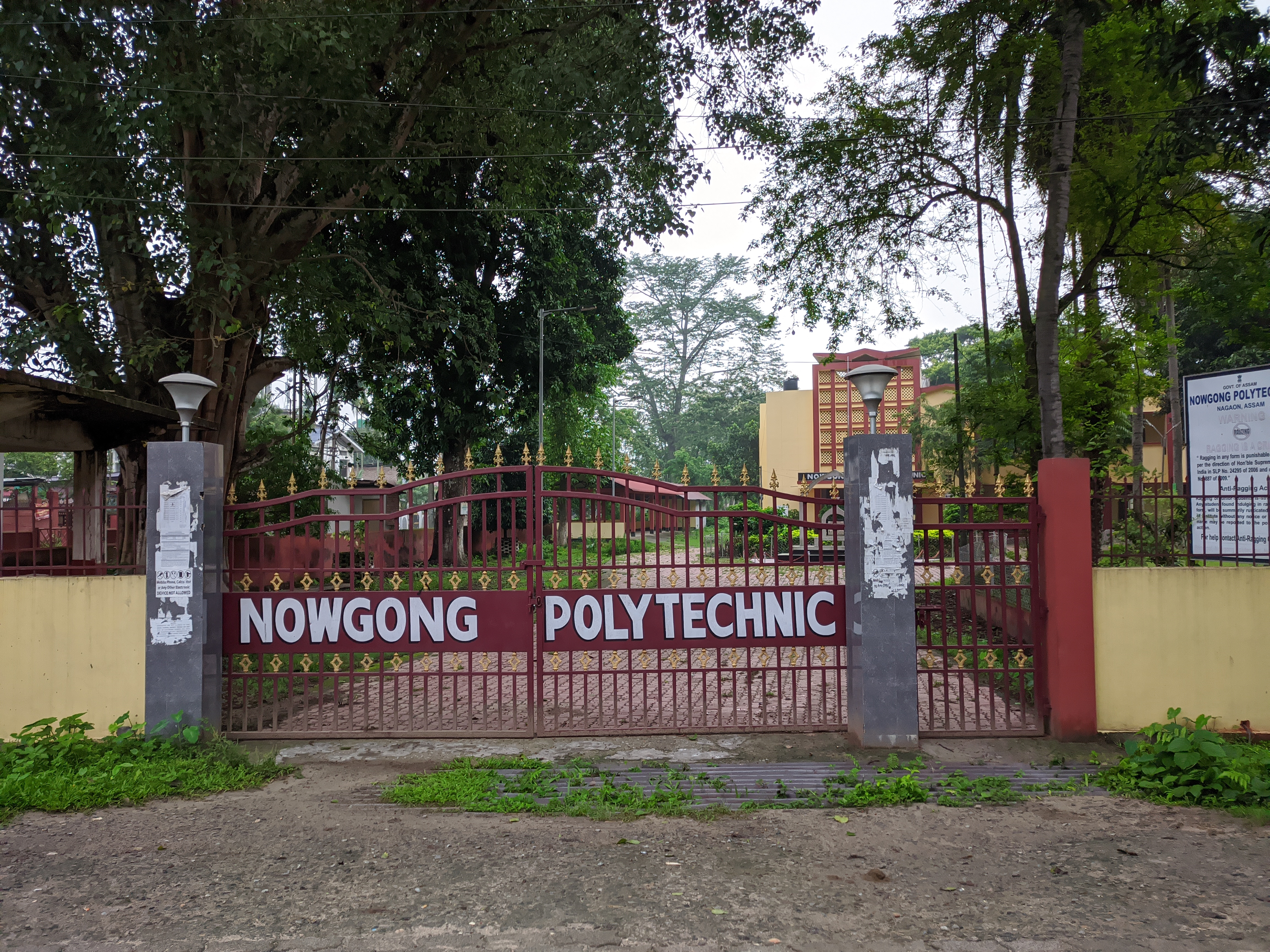 অসমীয়া: নগাঁও পলিটেকনিক